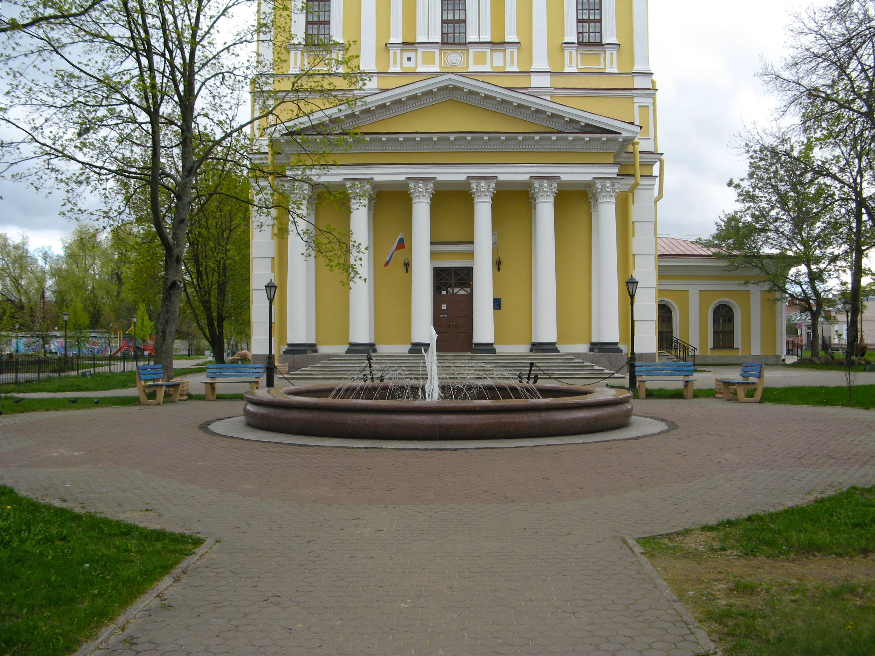 Башня городского водопровода с флигелем: Ленинградская улица, 2 литера Б, Кронштадт, Кронштадтский район, Санкт-Петербург